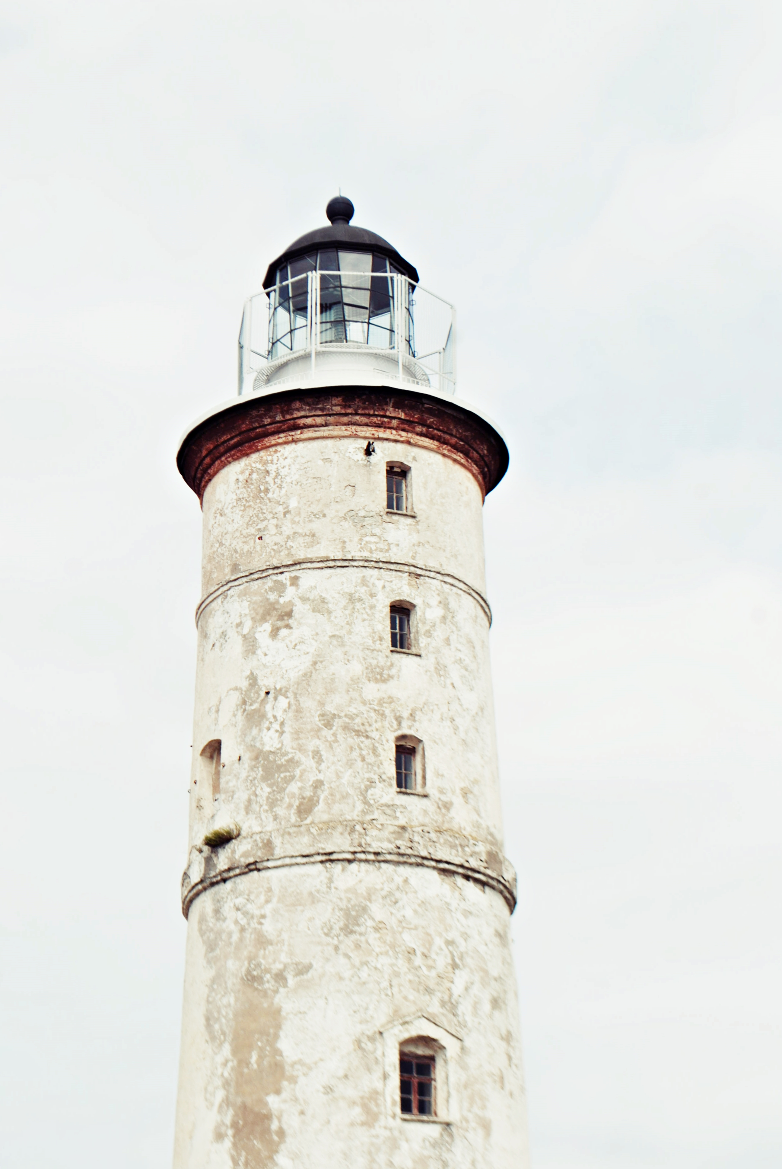 Tuletorn, Vilsandi. Ehitatud 1809.